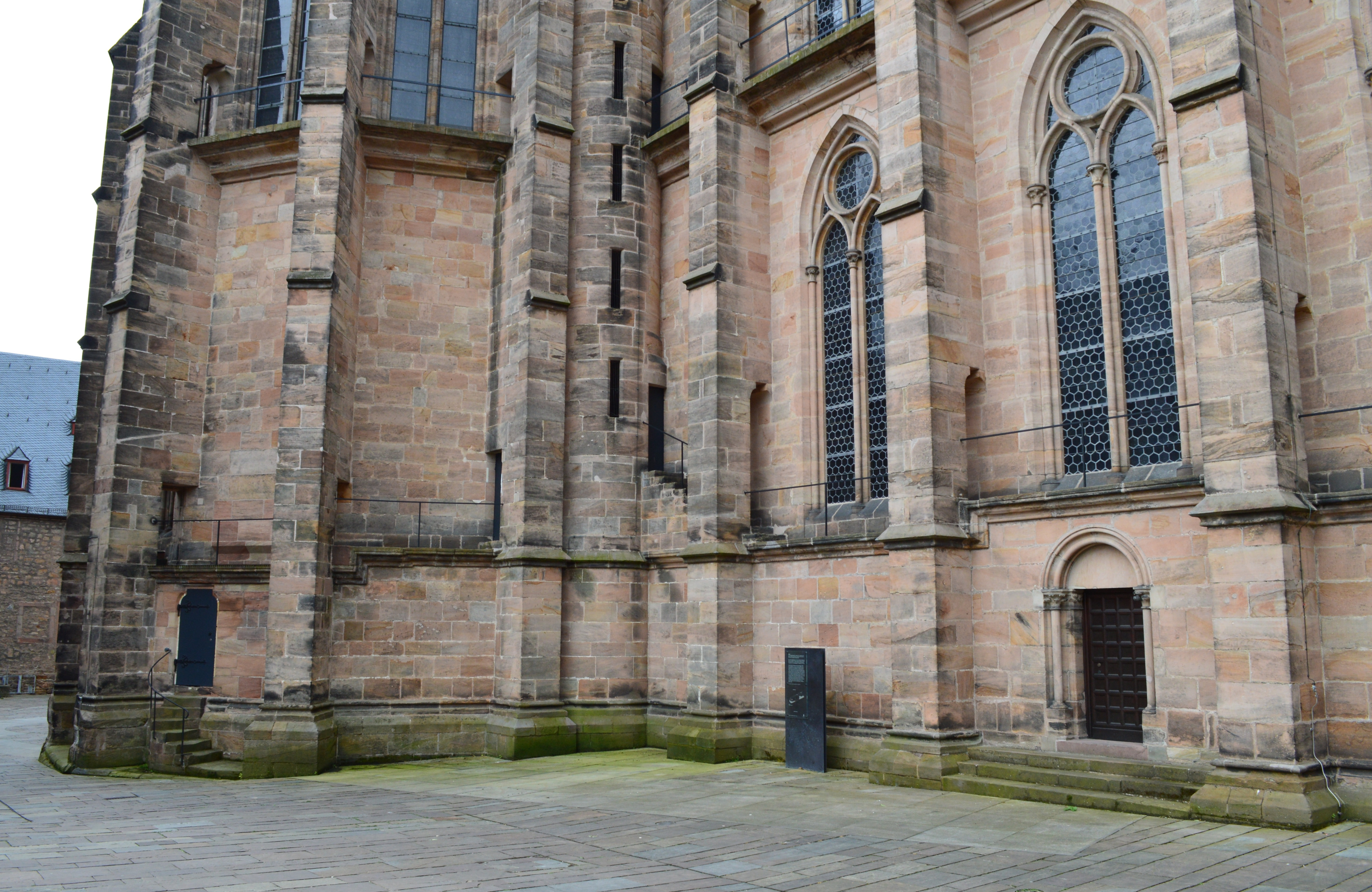 Elisabethkirche, Blickrichtung südsüdost mit Elisabeth-Hospital-Grundriss